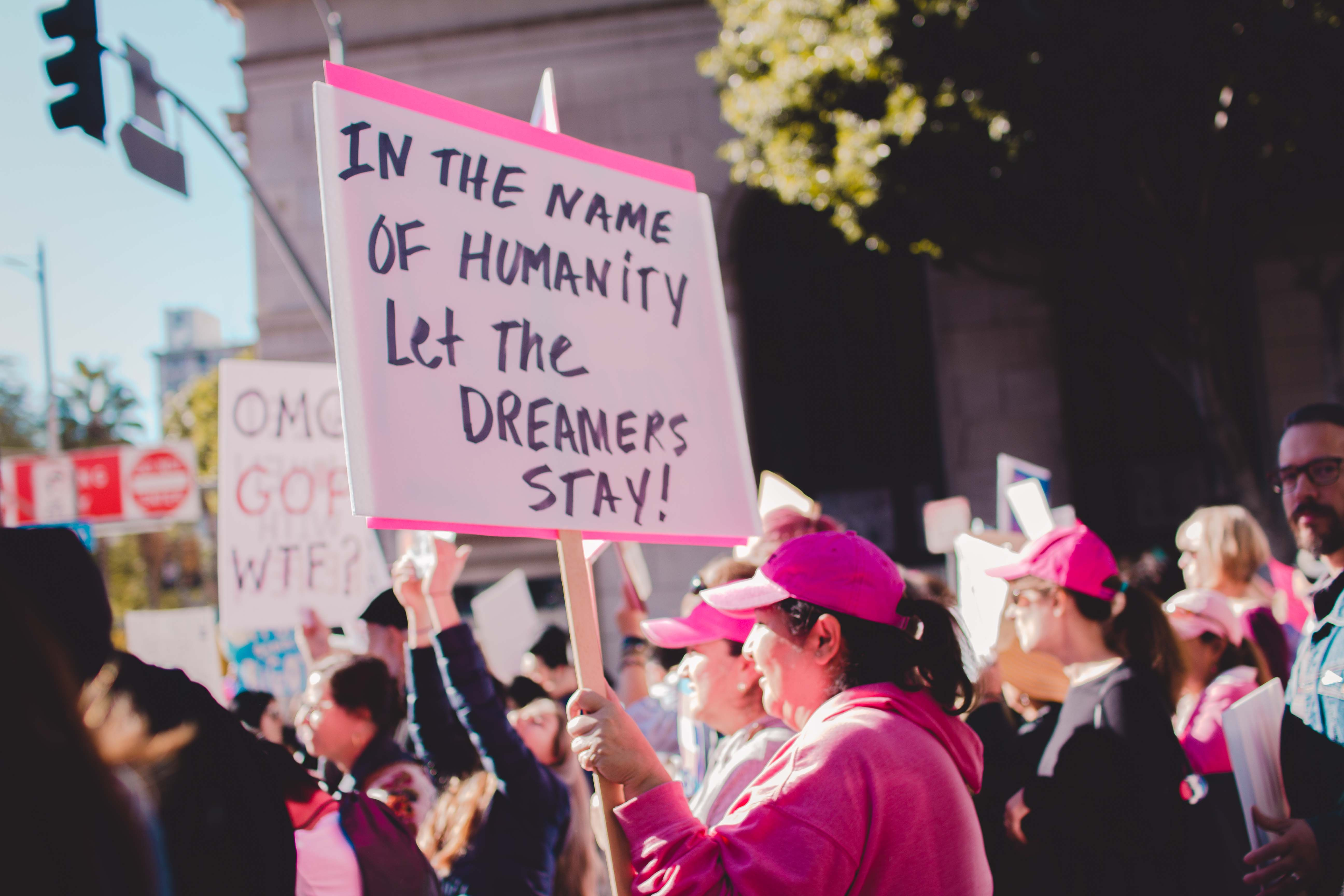 _MG_7971